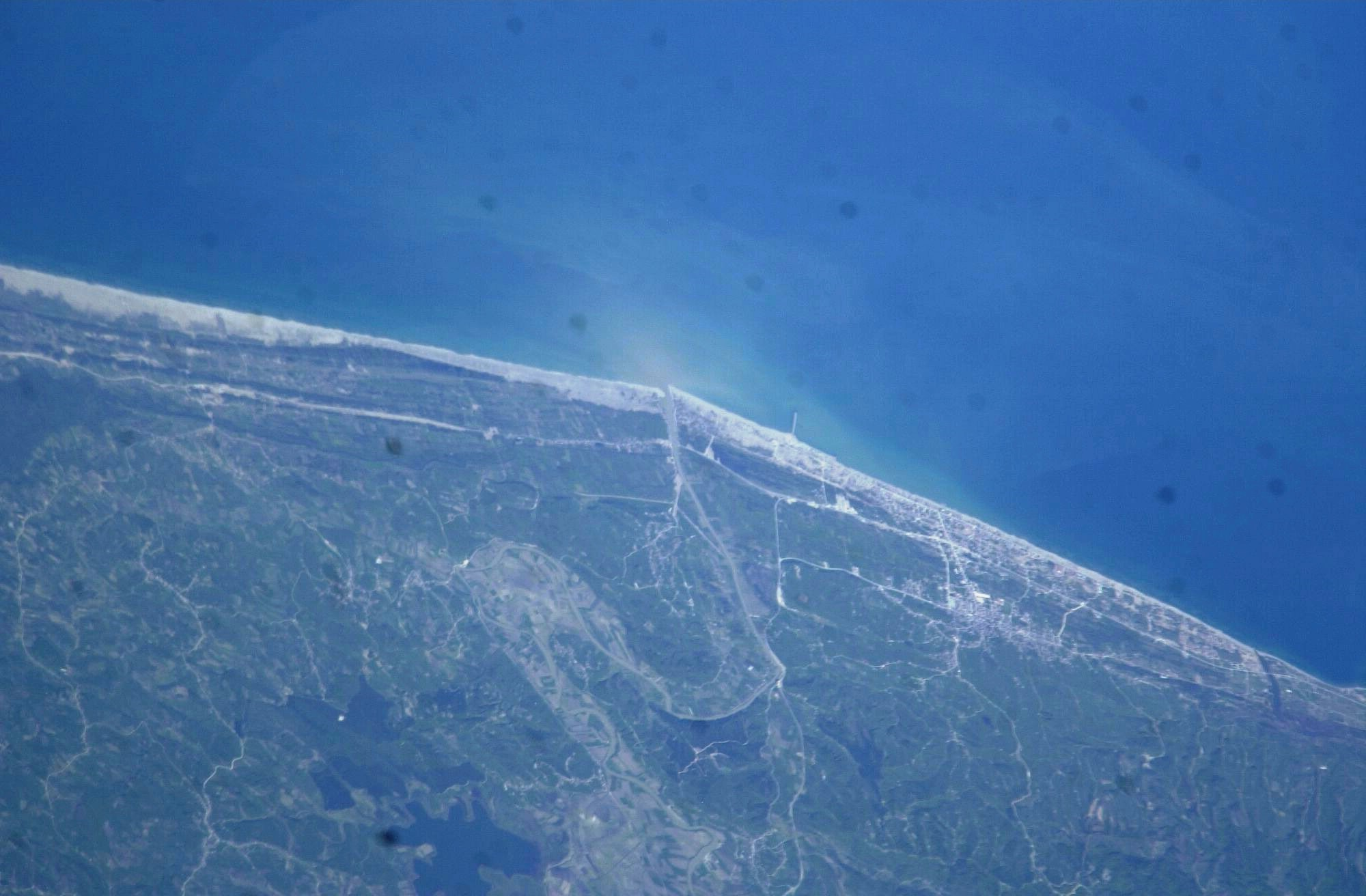 Karasu ve çevresinin 2003.05.02 tarihinde NASAnın uzaydan (382 km) çektiği fotoğrafı